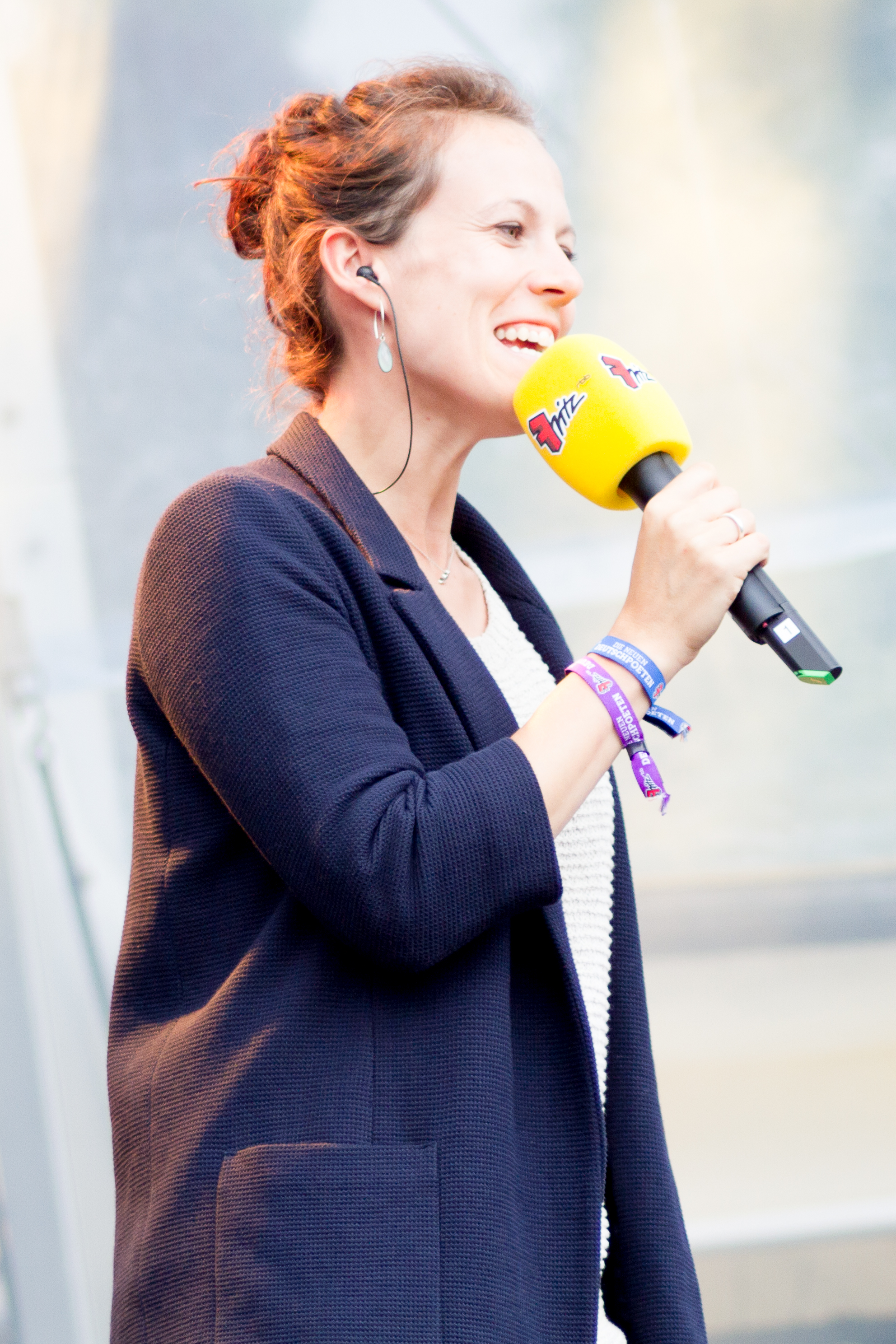 Kathrin Thüring beim Fritz - Die Neuen DeutschPoeten Musikfestival vom 5. September 2015 das in Berlin stattfand.